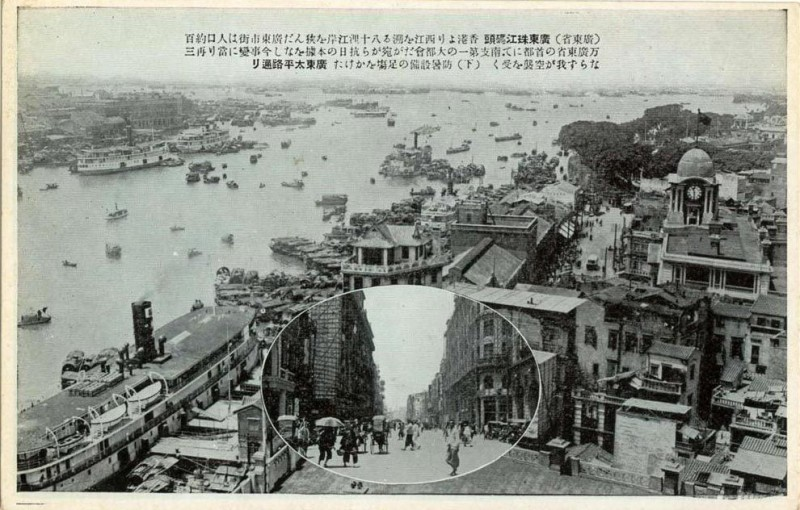 《廣東珠江碼頭》。從廣州西堤大新公司往下拍攝，右方（西）分別是廣東郵務管理局、塔影樓及粵海關大樓。小圖為鄰近的太平路。